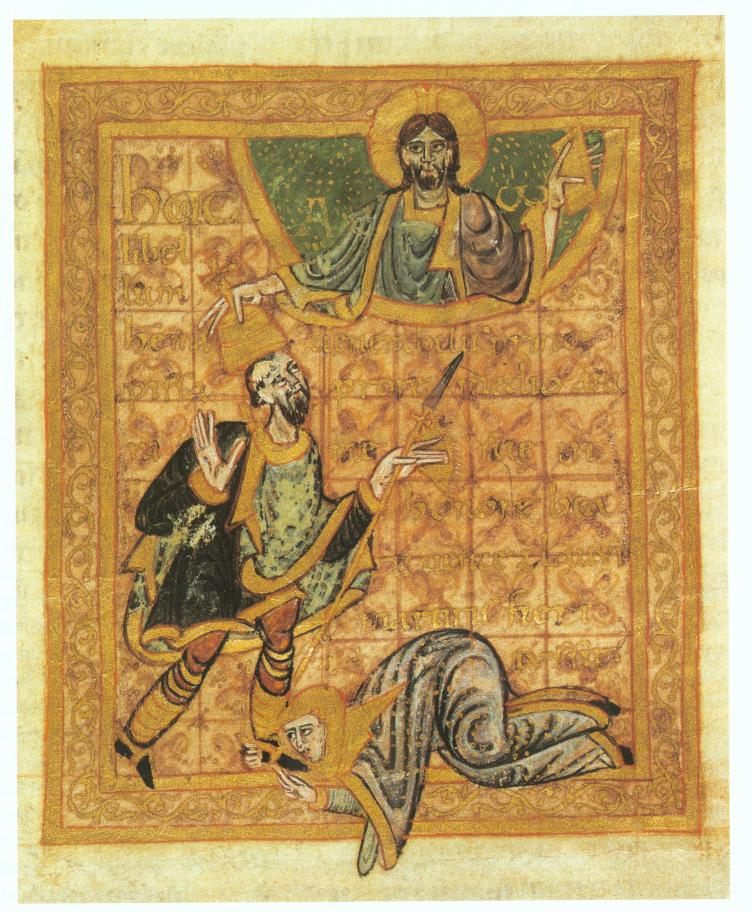 Vita des hl. Wenzel. Märtyrerkrönung König Wenzels. Wolfenbüttel, Herzog August Bibliothek, Guelf. 11,2 Augusteus 4, fol. 18v